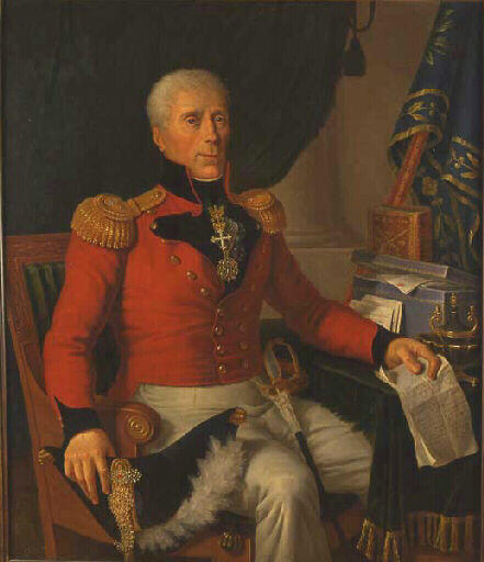 Portrait du Comte (et général) de Boigne en costume de Chevalier-Tireur